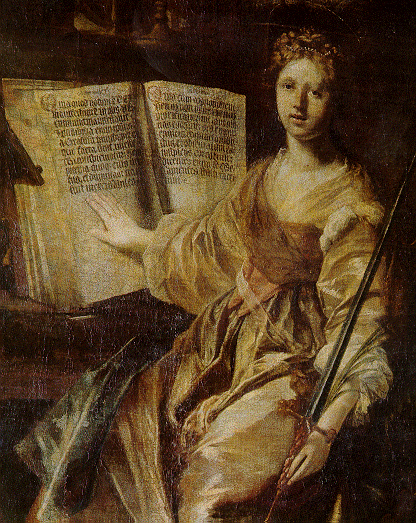 Svatá Kateřina, patronka filozofů